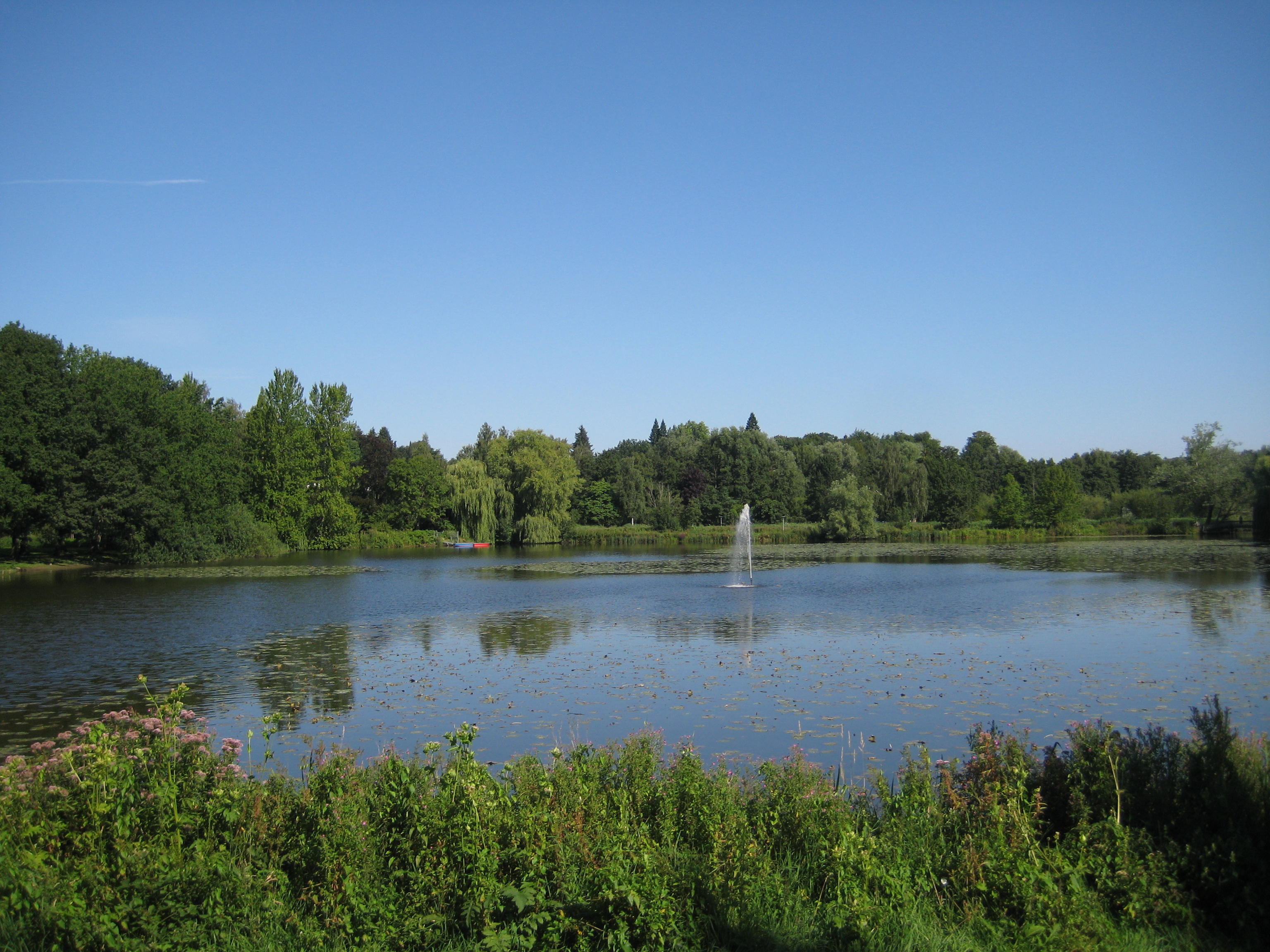 Im Naturerlebnisraum Bad Schwartau "Schwartautal" Der Kurpark mit dem Schwartauer See ist Teil des Naturerlebnisraumes.